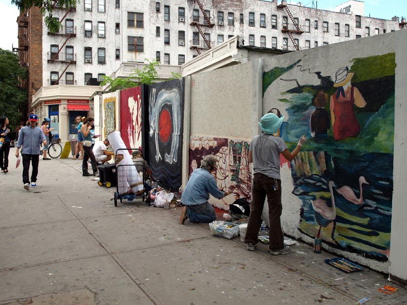 PLG Arts Mural project